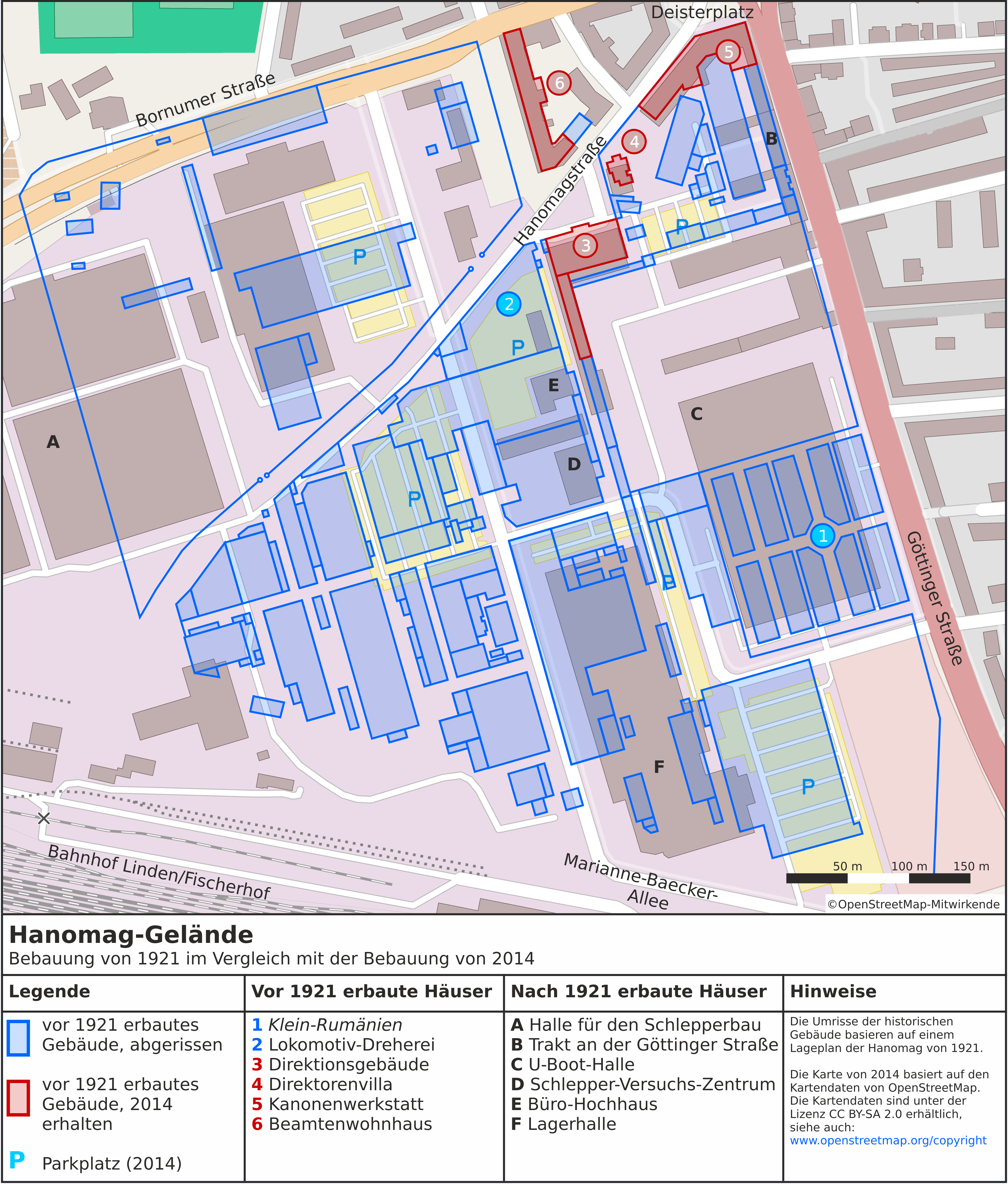 Hanomag-Gelände in Linden-Süd, Hannover: Dargestellt ist ein Vergleich der Bebauung von 1921 (blaue bzw. rote Umrisse) mit einer Karte von 2014. Die Umrisse der historischen Gebäude basieren auf einem alten Lageplan, der von der Hanomag herausgegeben wurde. Er kann z. B. in folgendem Buchkapitel gefunden werden: Michael Mende: "Die historischen Hanomag-Gebäude". In: Horst-Dieter Görg (Hrsg.): "Pulsschlag eines Werkes. 160 Jahre Hanomag." Mundschenk-Verlag, Soltau 1998. ISBN 3-00-002585-5. S. 52–57. Die Karte von 2014 basiert auf den Kartendaten von OpenStreetMap. (c) OpenStreetMap contributors